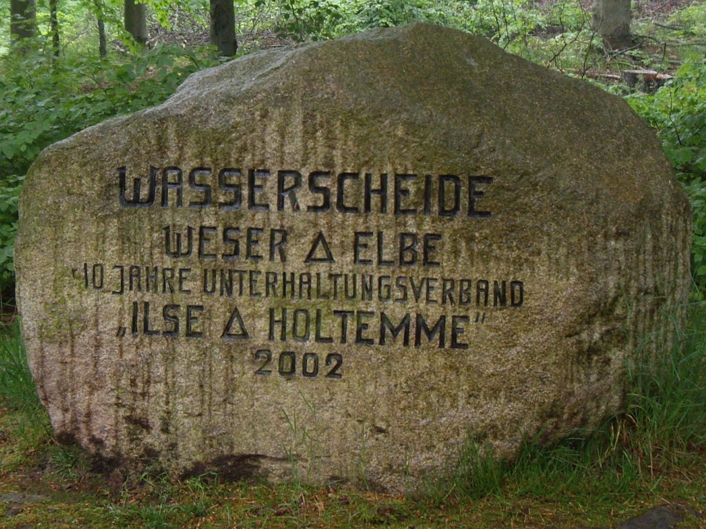 Wasserscheide von Weser Elbe - Wasserscheide: nach Norden Entwässerung über Utschenteich - Rammelsbach - Ilse - Oker - Aller und Weser. Nach Südosten, später Nordosten Bach des Himmelpfortentales - Holtemme - Bode - Saale - Elbe.